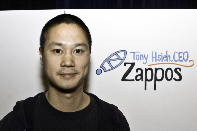 tony hsieh, ceo